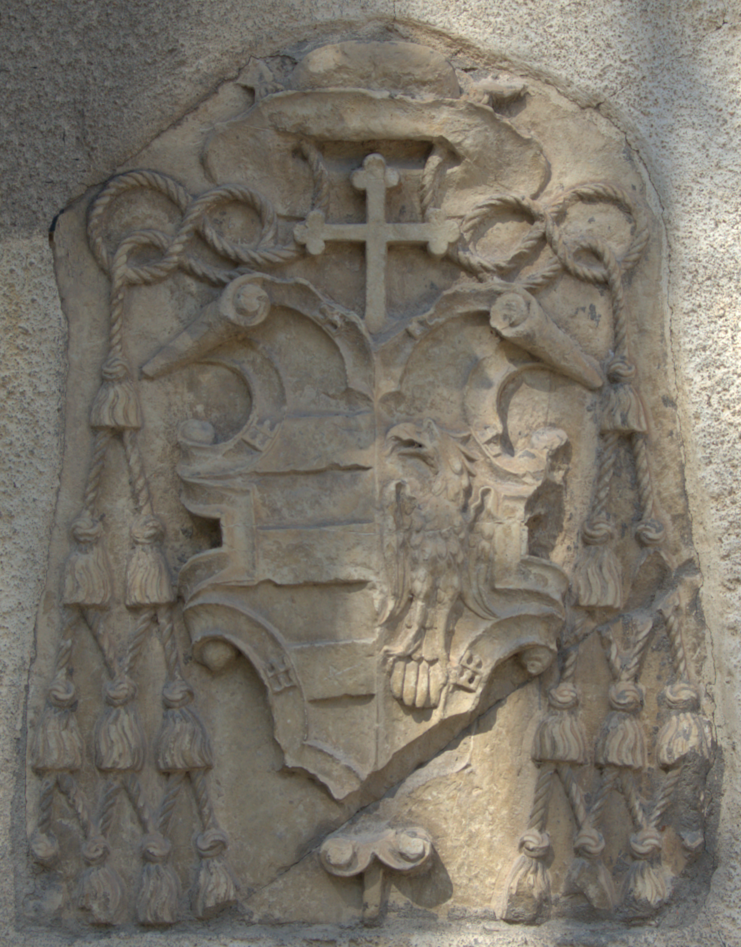 Escudo de armas del cardenal de Toledo Juan Pardo de Tavera, situado en el Palacio Arzobispal de Alcalá de Henares (Comunidad de Madrid - España) a mediados del siglo XVI (1534 – 1545).